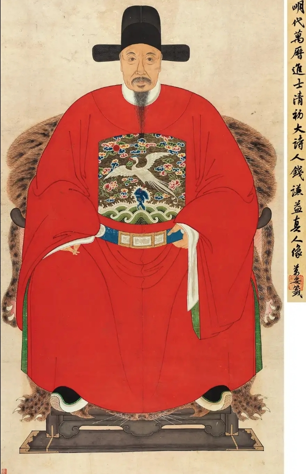 錢謙益（1582年10月22日－1664年6月17日），字受之，號牧齋，晚號絳雲樓主人、蒙叟、東澗老人，又因其住址而稱虞山、因其職位而稱宗伯，直隸常熟縣（今江蘇省蘇州市常熟市）人，萬曆三十八年探花。官至禮部尚書。後降清，任禮部侍郎。